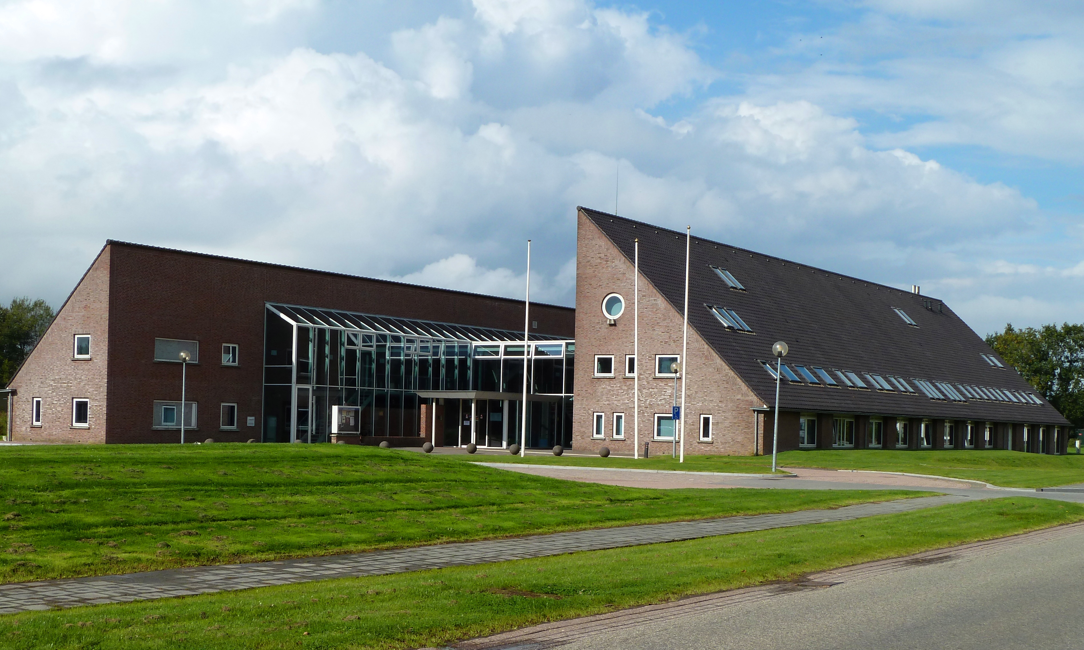 Gemeentehuis van De Marne in Leens (Groningen, Nederland). Het gebouw werd opgeleverd in 1993 en verbeeldt een Groninger boerderij